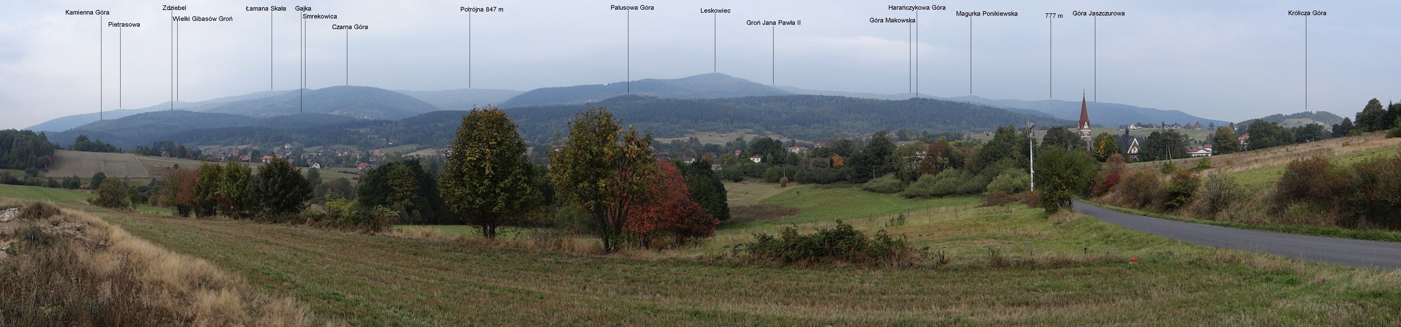 Panorama widokowa z Krzeszowa (z drogi do Stryszawy)